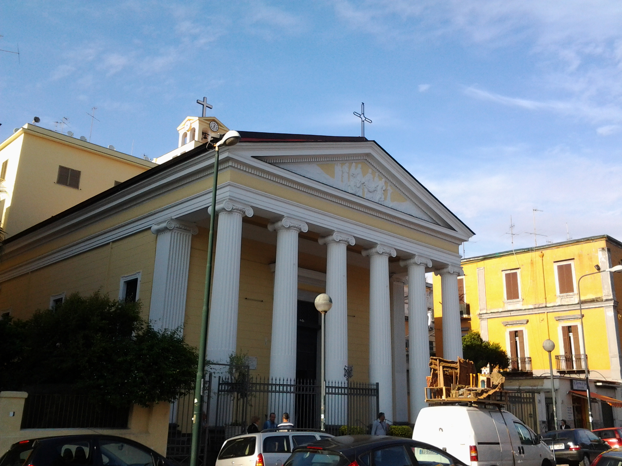 Chiesa di Maria Santissima Desolata, Napoli